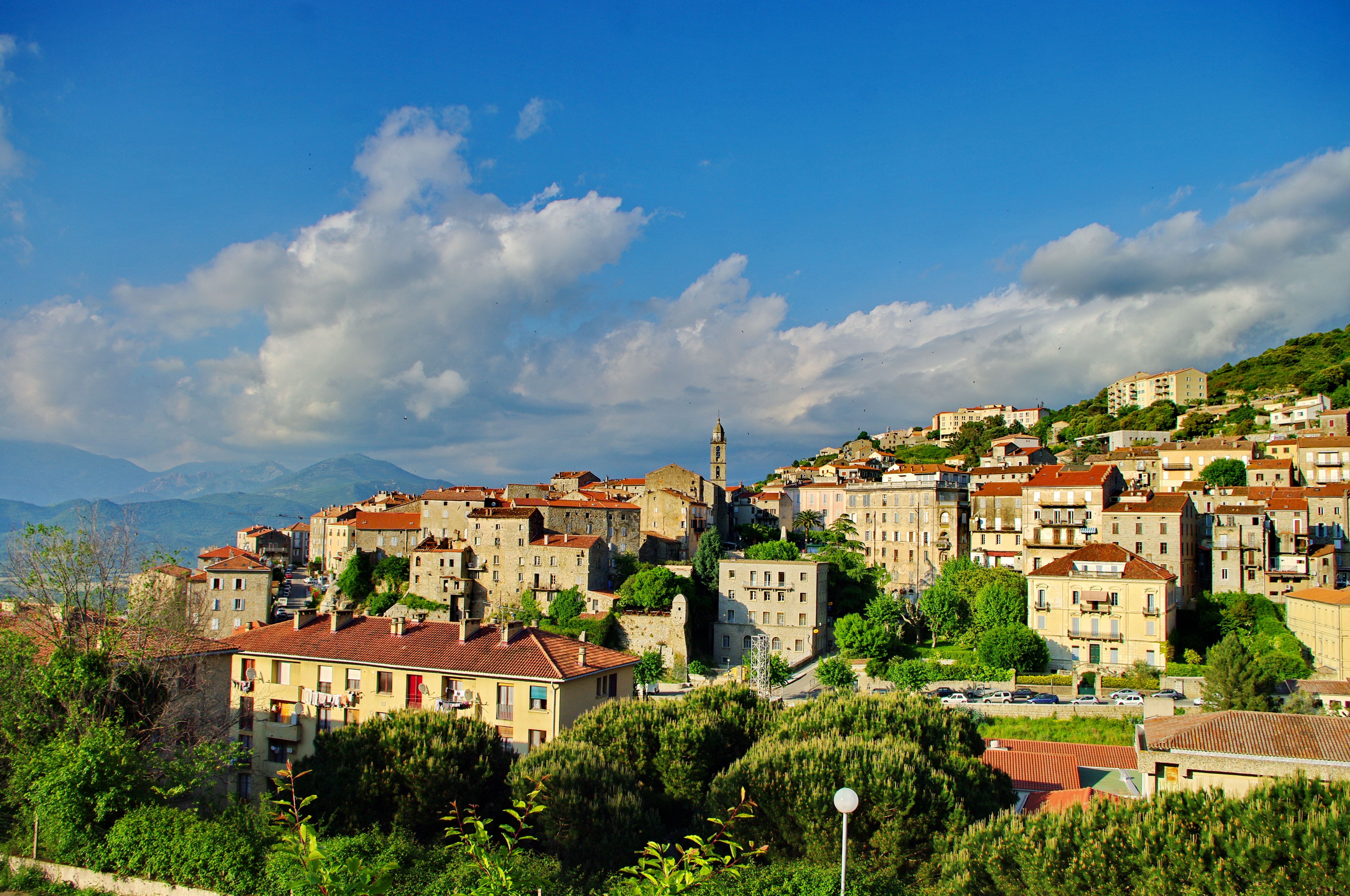 Vue de la vieille ville de Sartène.